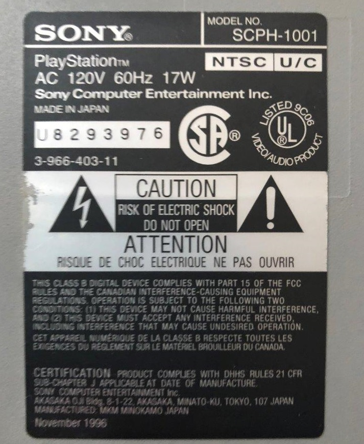 PlayStation 北米地域用 NTSC U/C型 SCPH-1001の裏面